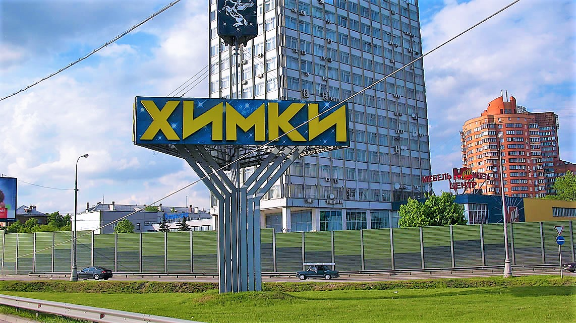 Въезд в г.Химки со стороны Москвы.